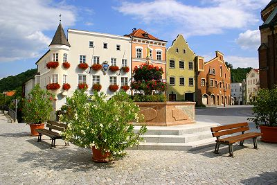 Marktbrunnen Kraiburg Sonstiges: GNU FDL